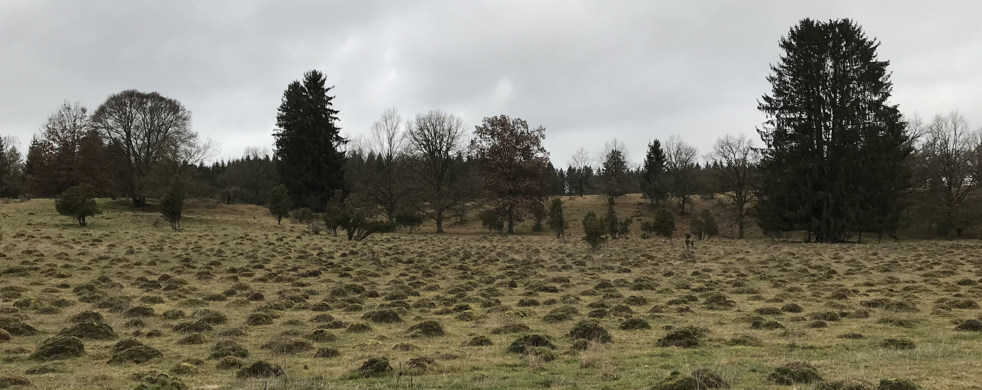 (NSG:BW-1.023)_Dellenhäule - Ameisenstadt. Hier befinden sich tausende Nesthügel der Gelben Wiesenameise.